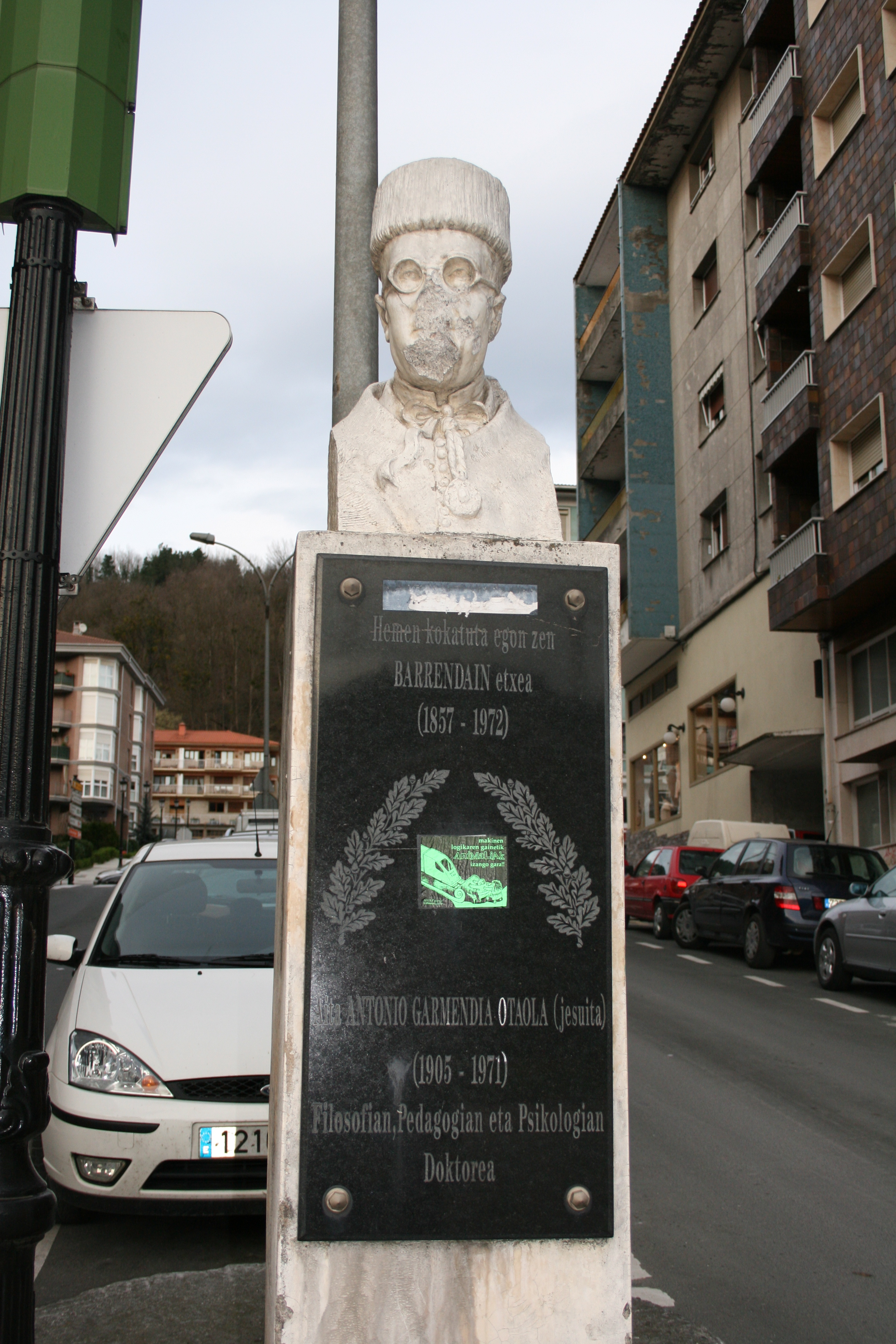 Garmendia Otaolaren irudia Beasainen / Garmendia Otaola statue in Beasain